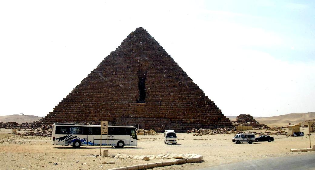 Face norte da pirâmide do faraó Miquerinos.